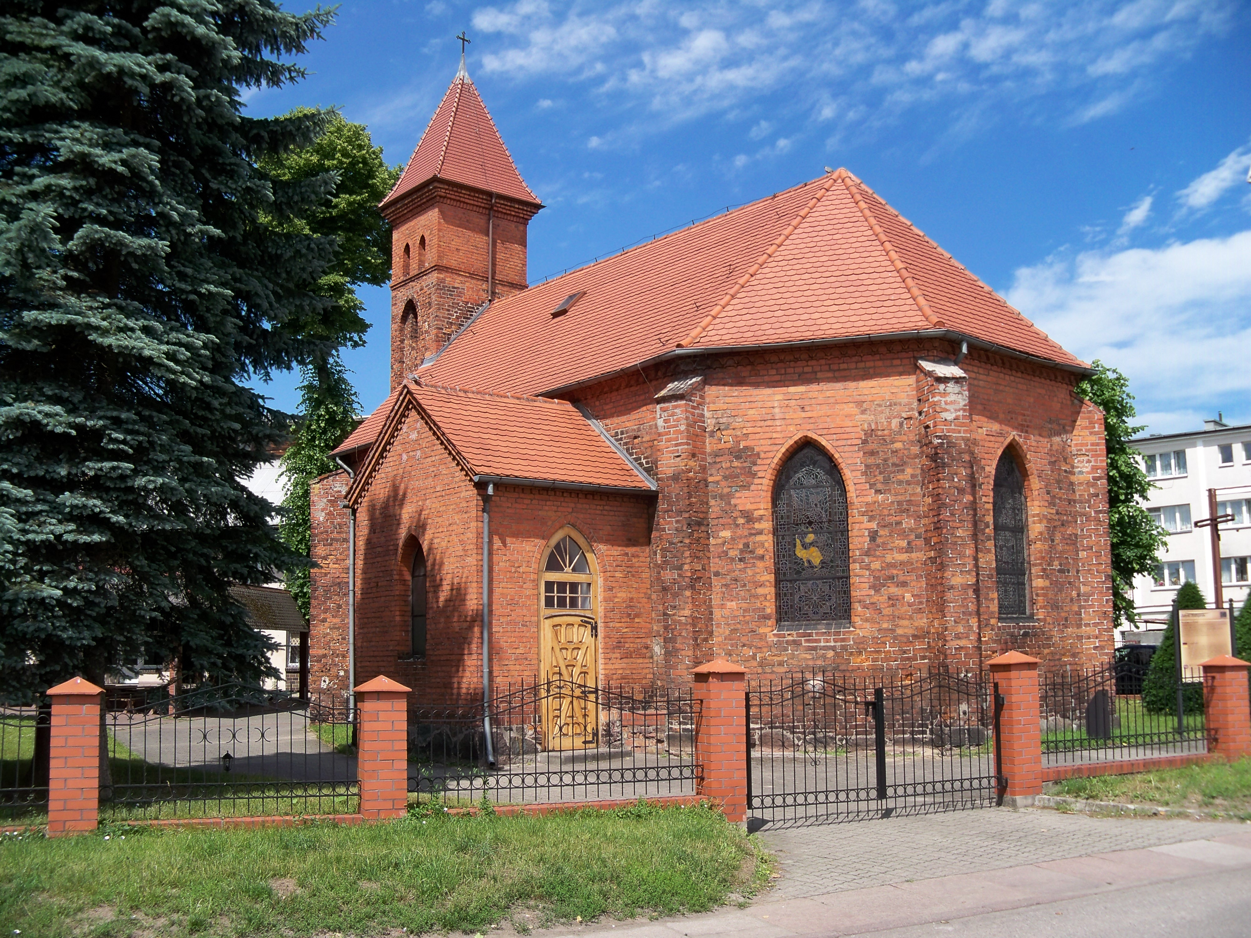 kościół pomocniczy parafii św. Jadwigi